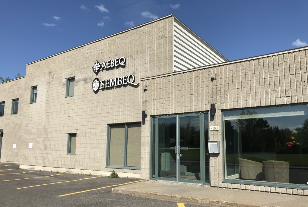 Séminaire Baptiste Évangélique du Québec, 9780, rue Sherbrooke Est, Montréal, Québec